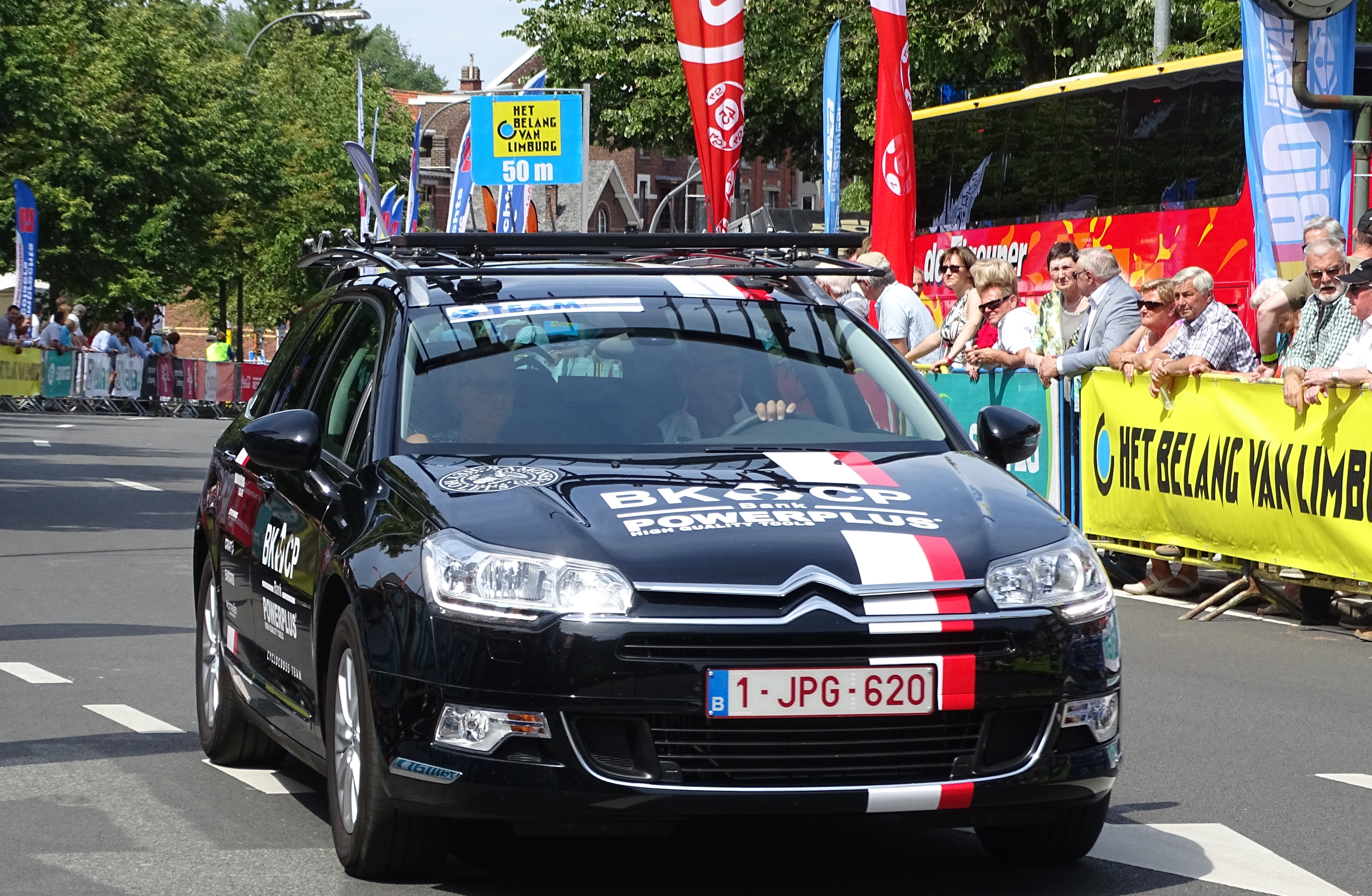 Reportage réalisé le dimanche 14 juin à l'occasion du départ et de l'arrivée du Tour du Limbourg 2015 à Tongres, Belgique.